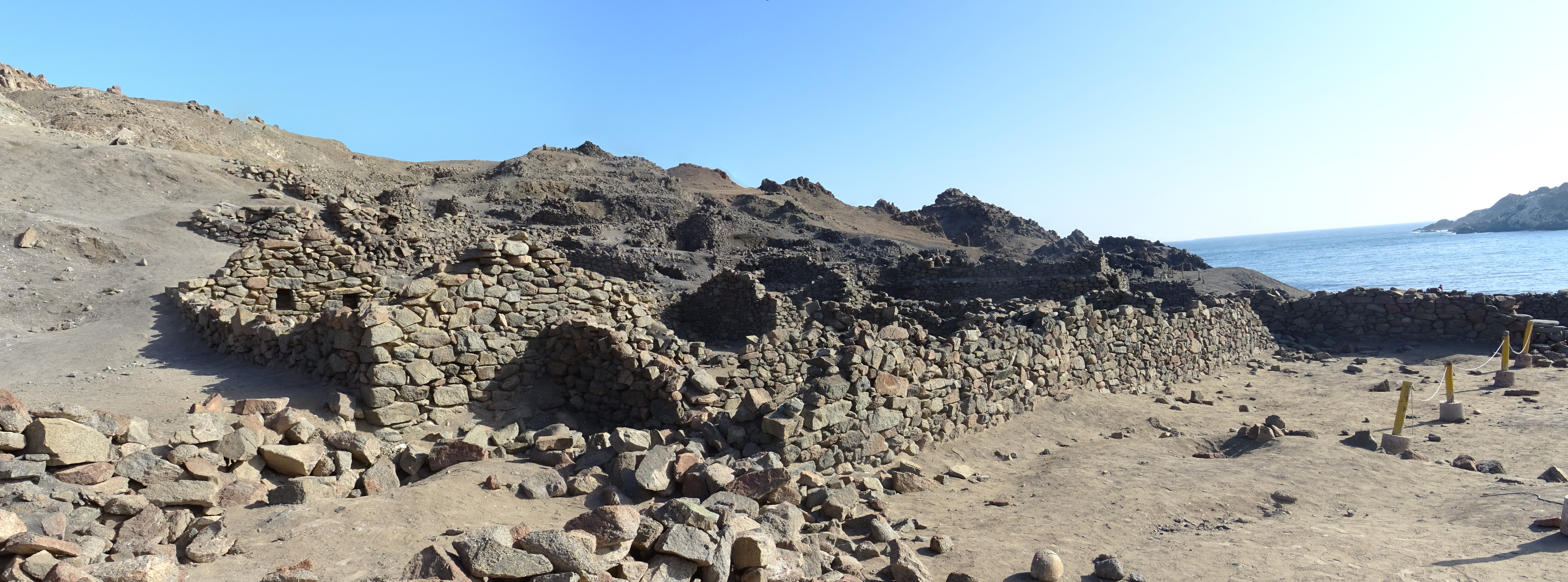 Archäologische Fundstätte Quebrada de la vaca oder Puerto Inca, nahe Chala, Provinz Arequipa, Peru